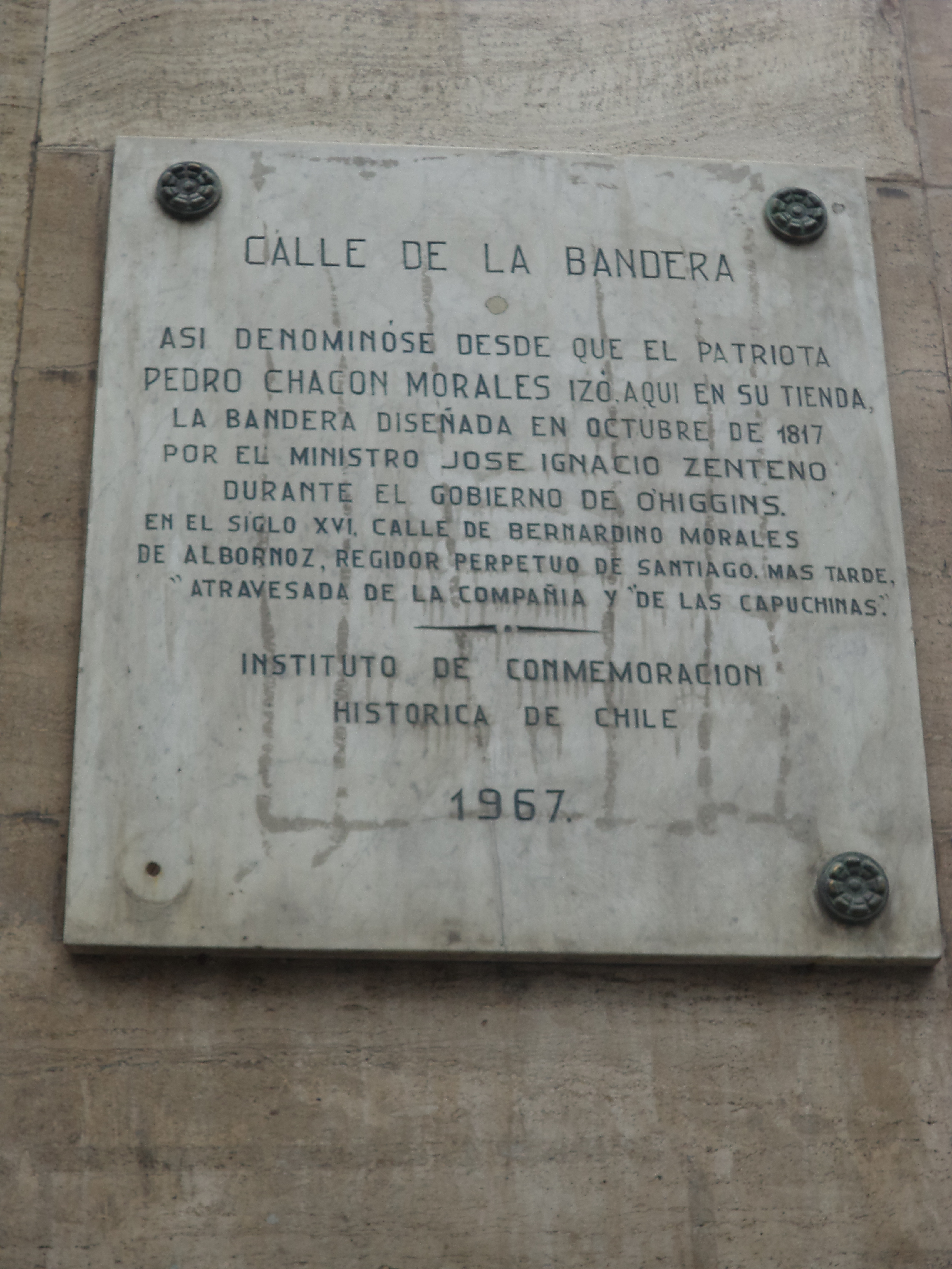 Placa del Instituto de Conmemoración Histórica de Chile referente a calle Bandera de Santiago de Chile.